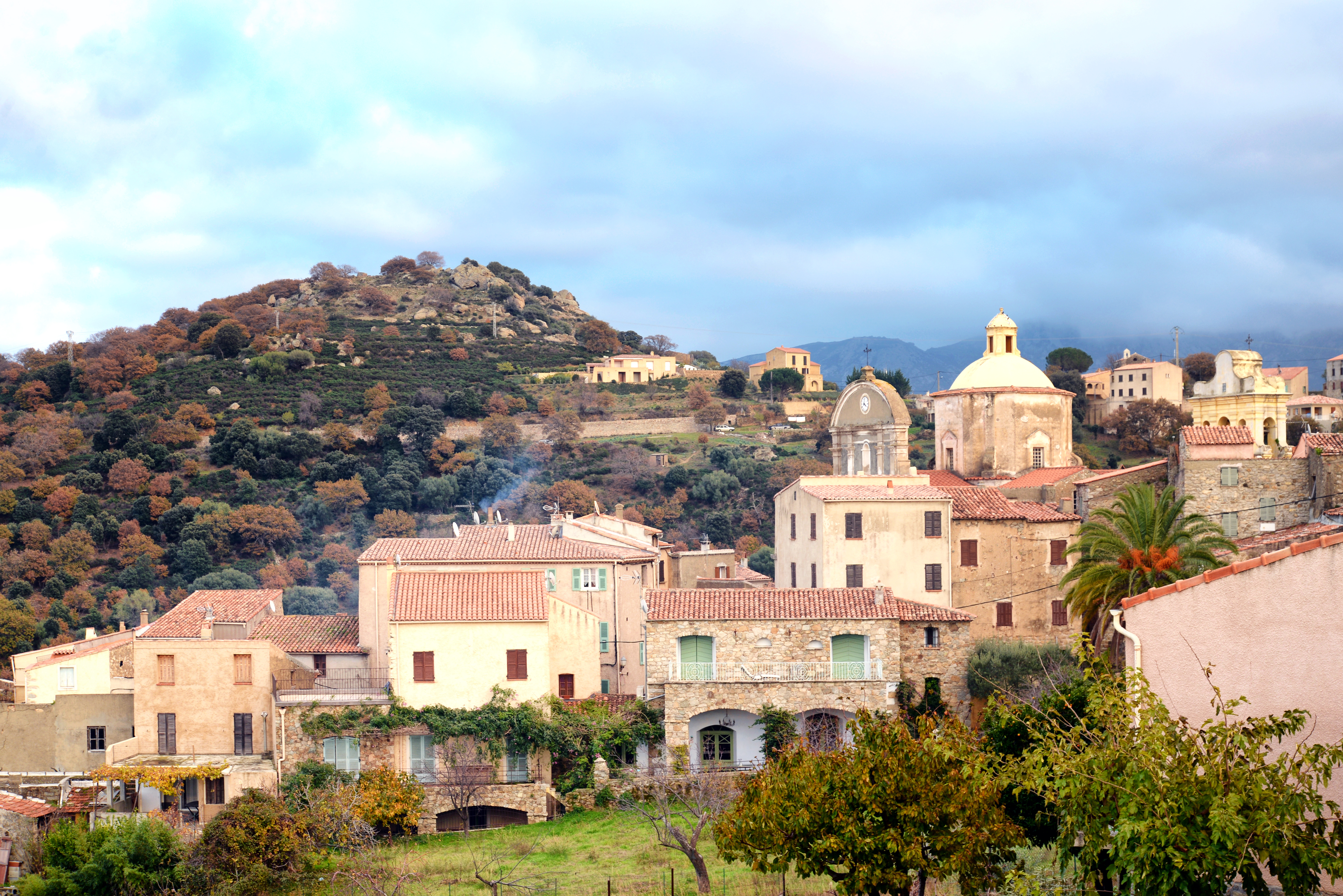 Cateri, Balagne (Corse) - Le haut du village de Cateri. À l'arrière-plan, le hameau de San Cesareo dominé par la colline Carco (431 m).